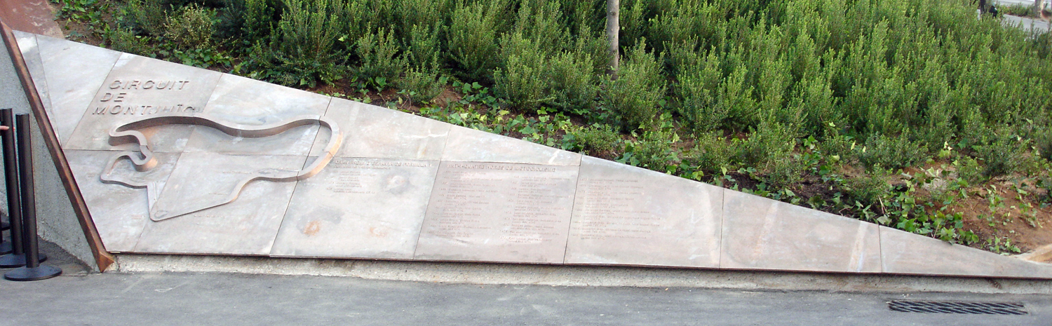 Placa commemorativa colocada al costat del Museu Olimpic de Barcelona